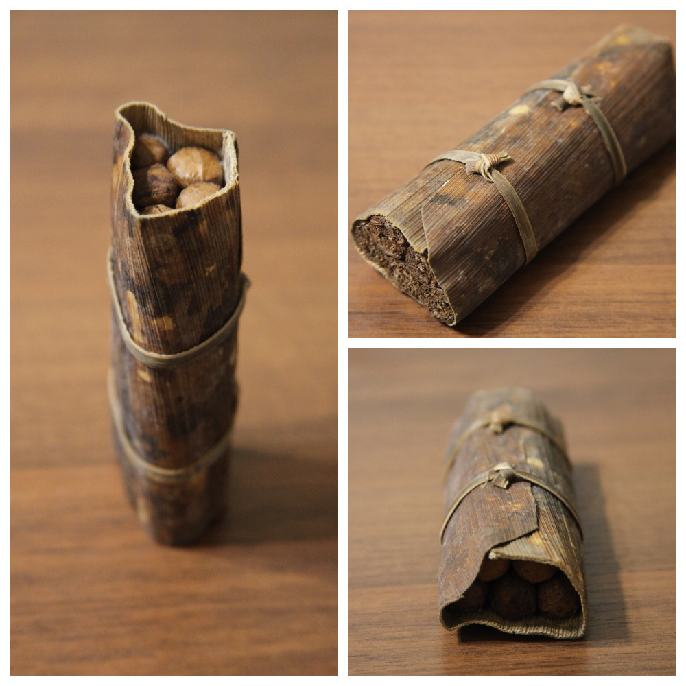 5 витол Montecrosto №4 в оригинальной упаковке